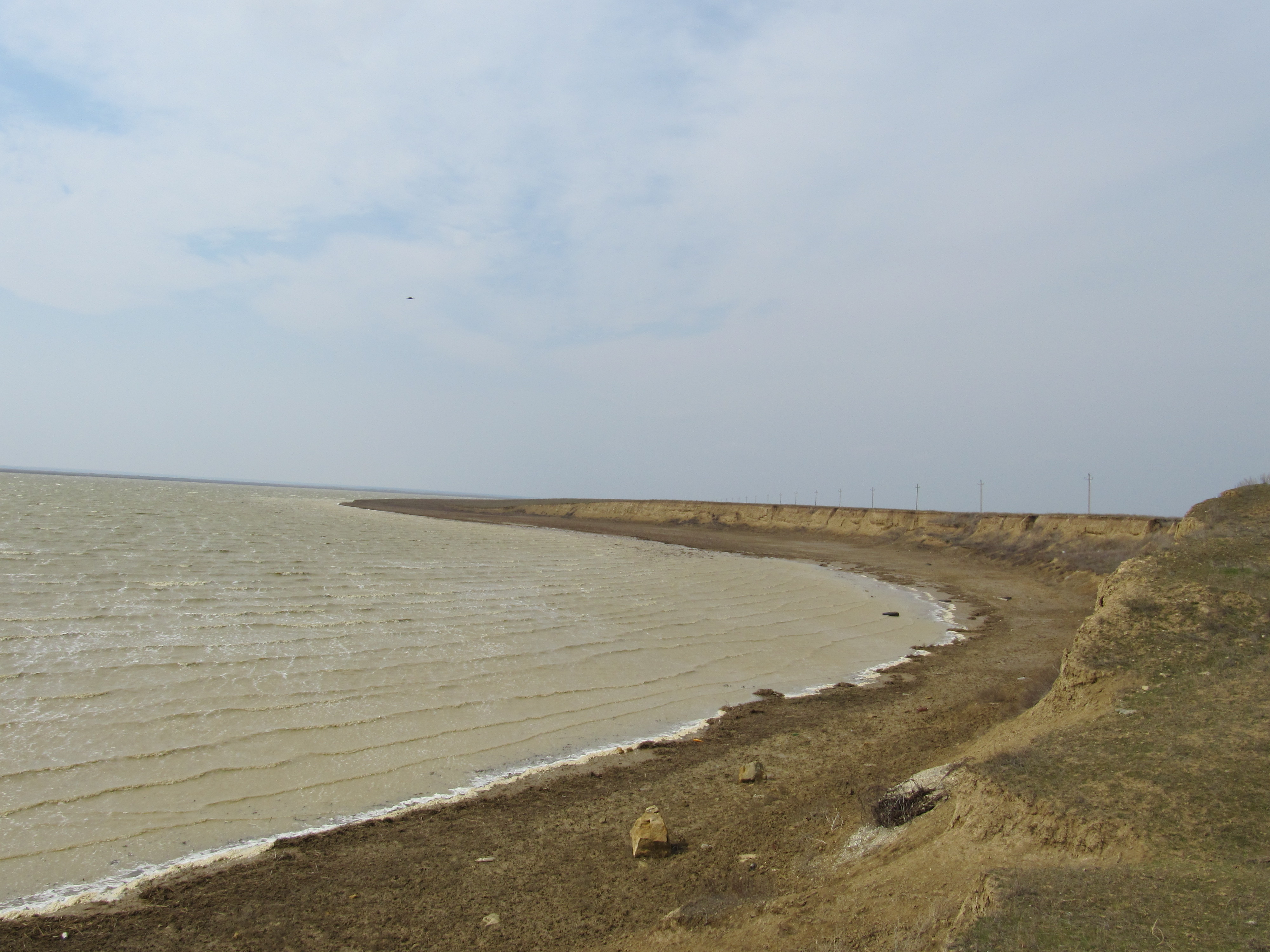 Река Маныч